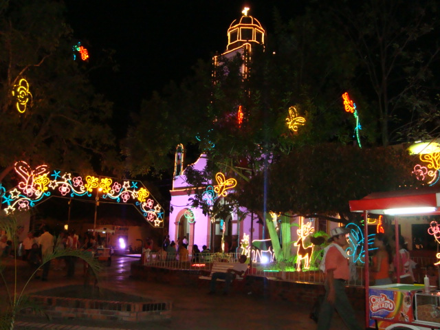 parque